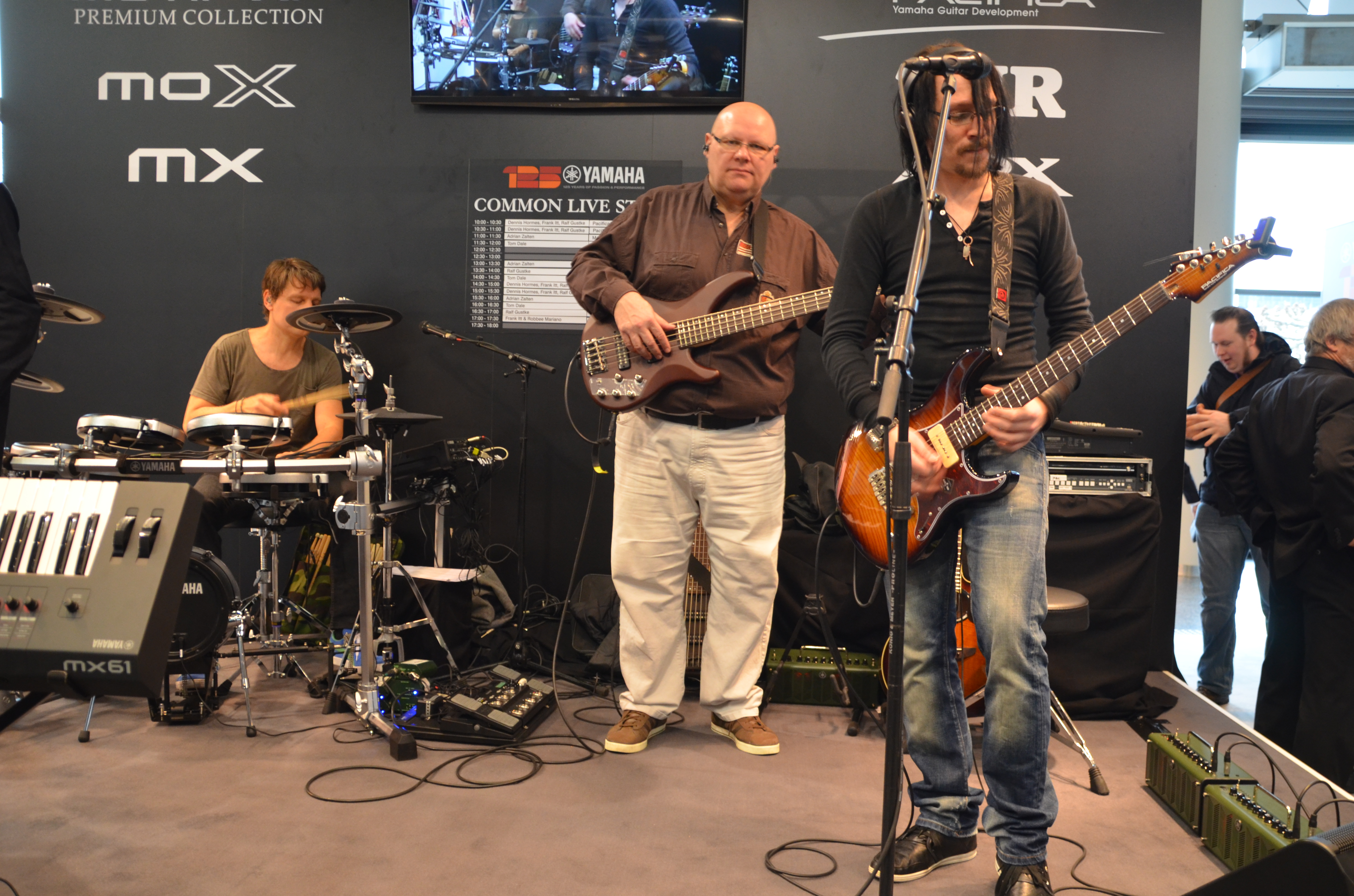 Musikmesse Frankfurt 2013, von Links: Ralf Gustke an der E-Drum, Frank Itt am Bass, Dennis Hormes an der E-Gitarre